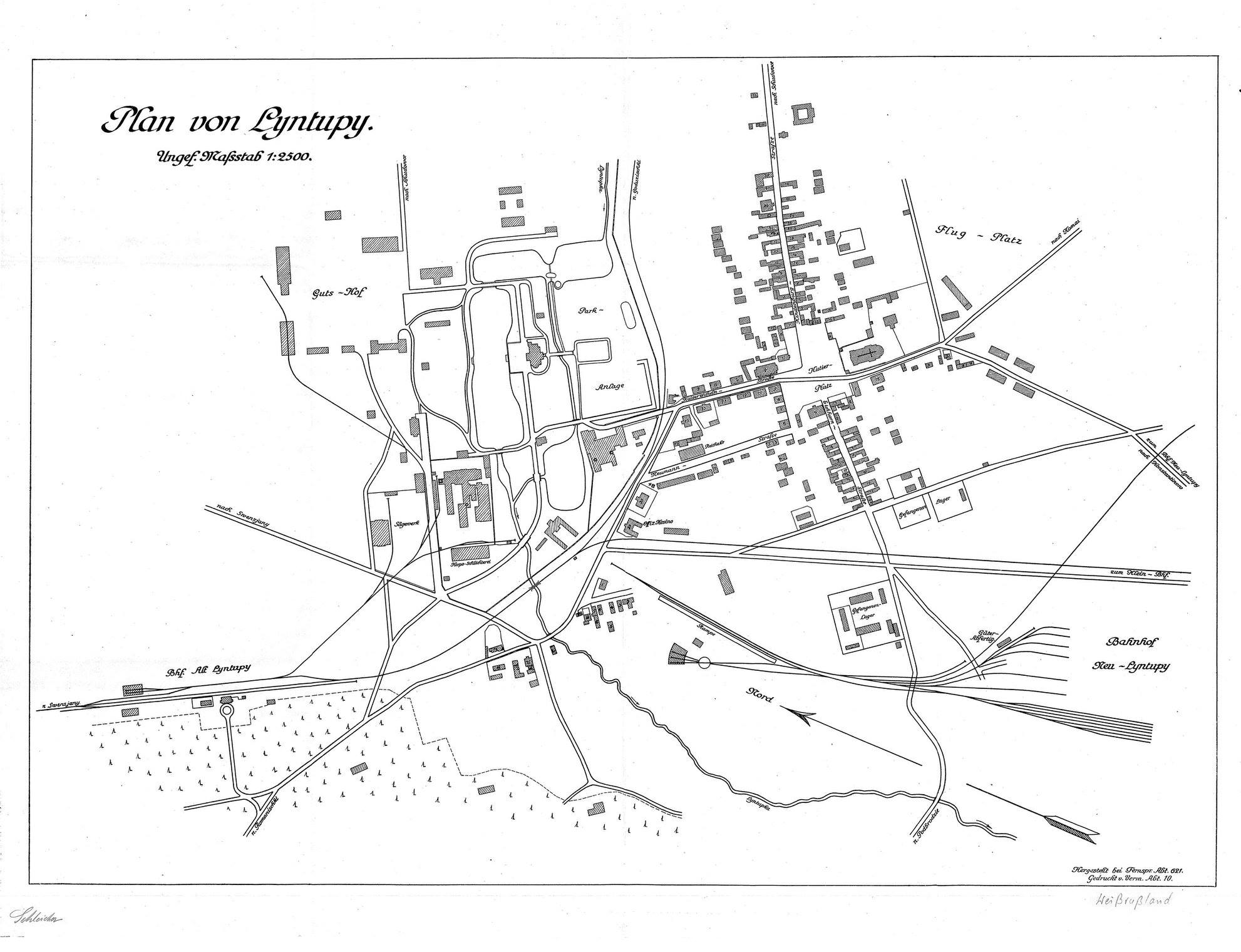 Беларуская (тарашкевіца): Лынтупы (Łyntupy). Плян мястэчка